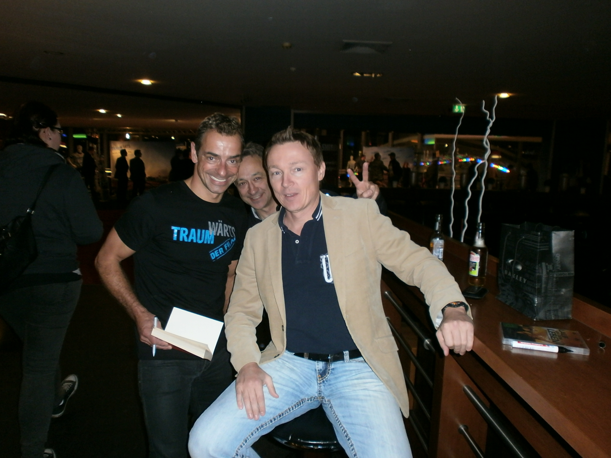 Premiere seines neuen Films "Traumwärts" im UCI Kinowelt Bochum